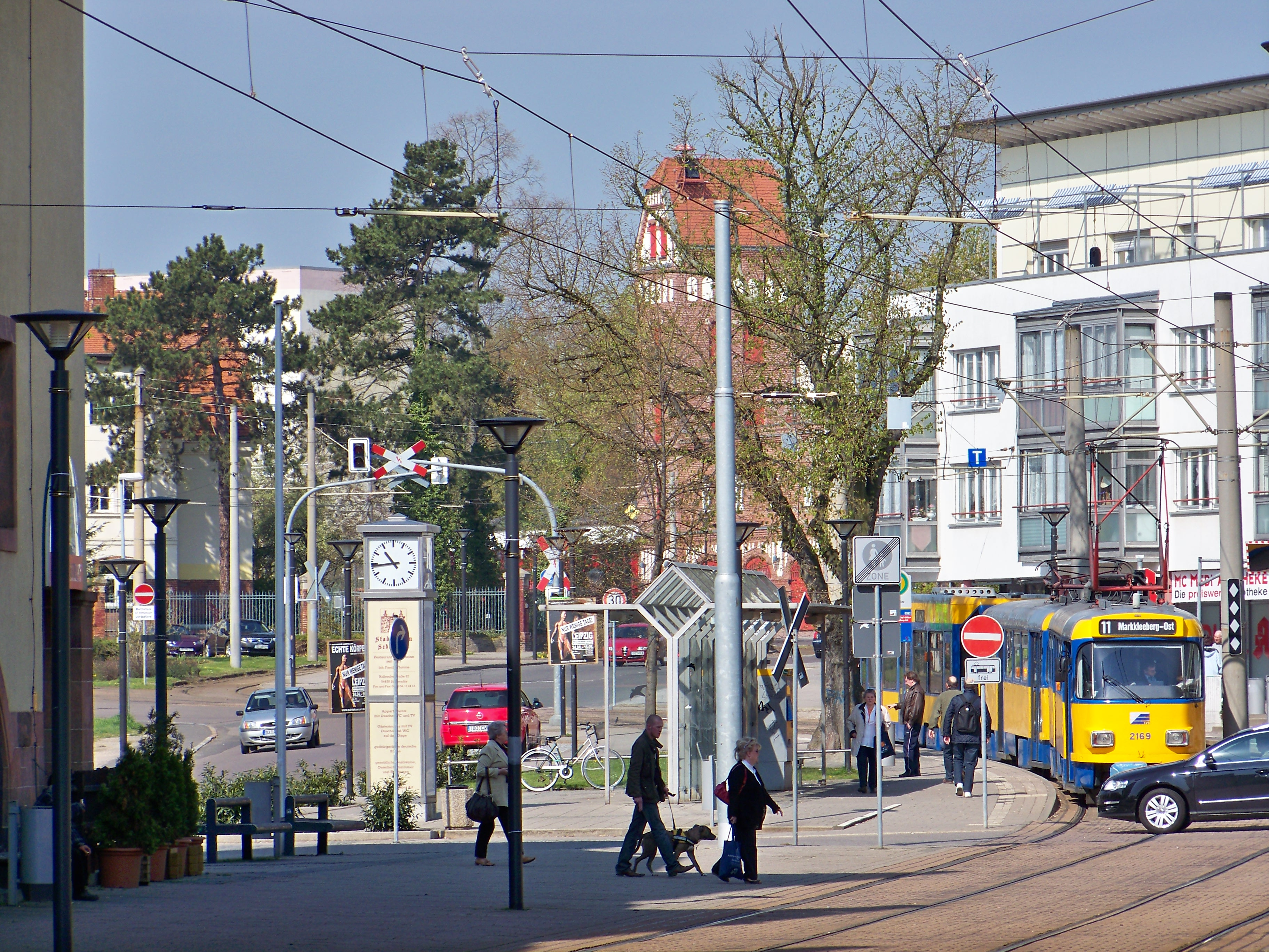 Rathausplatz in Schkeuditz bei Leipzig